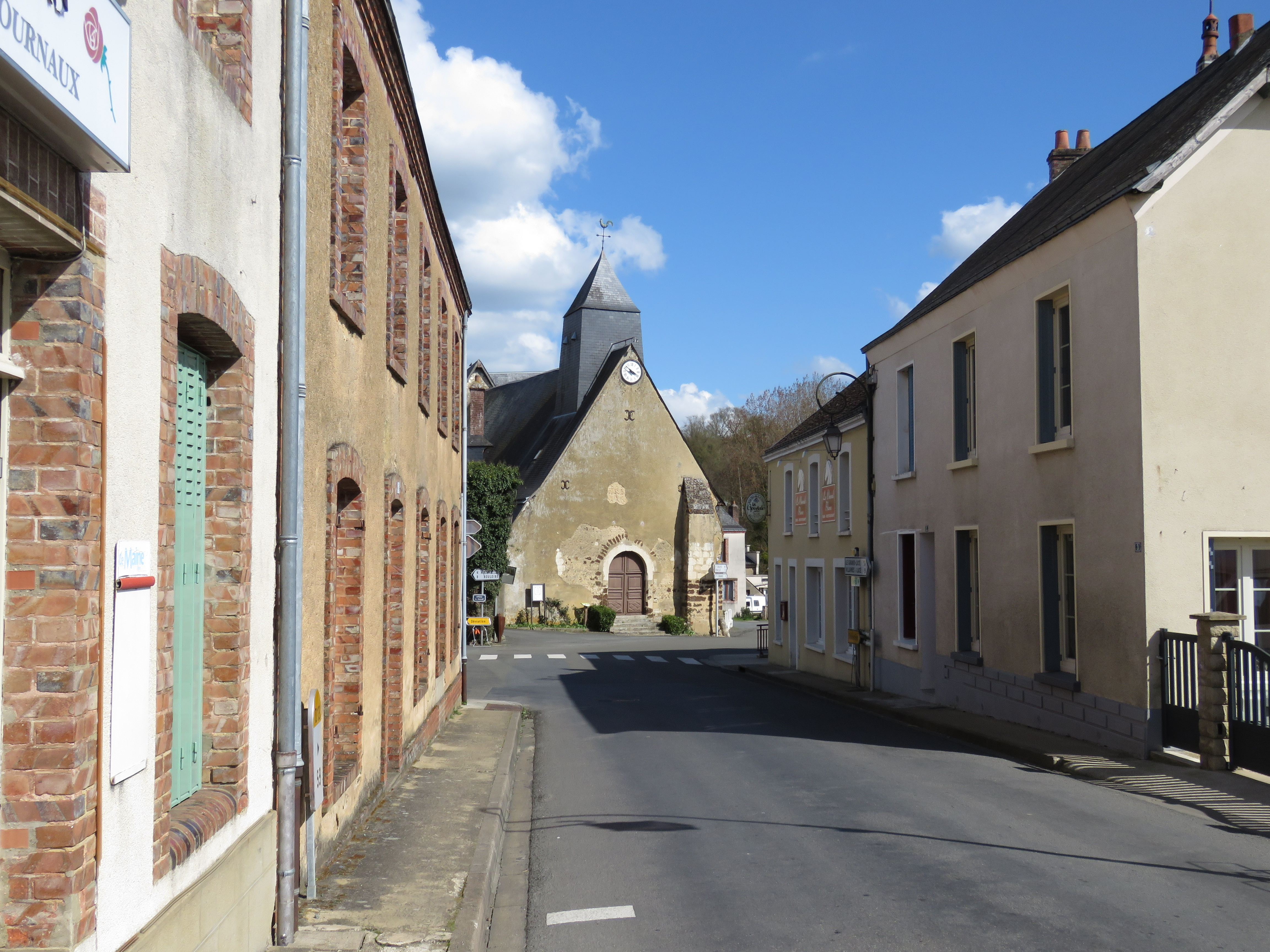 Église Saint-Martin.